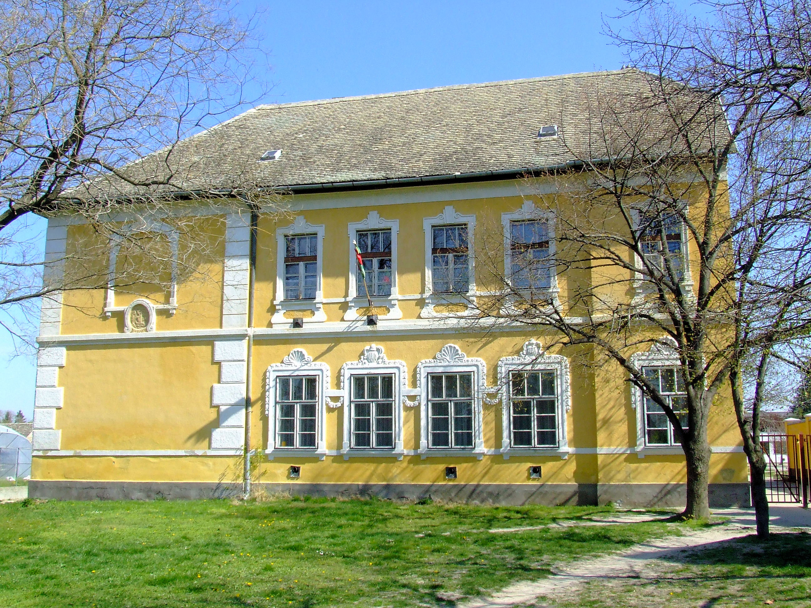 Épület a hajósi Szent Imre-templom mellett